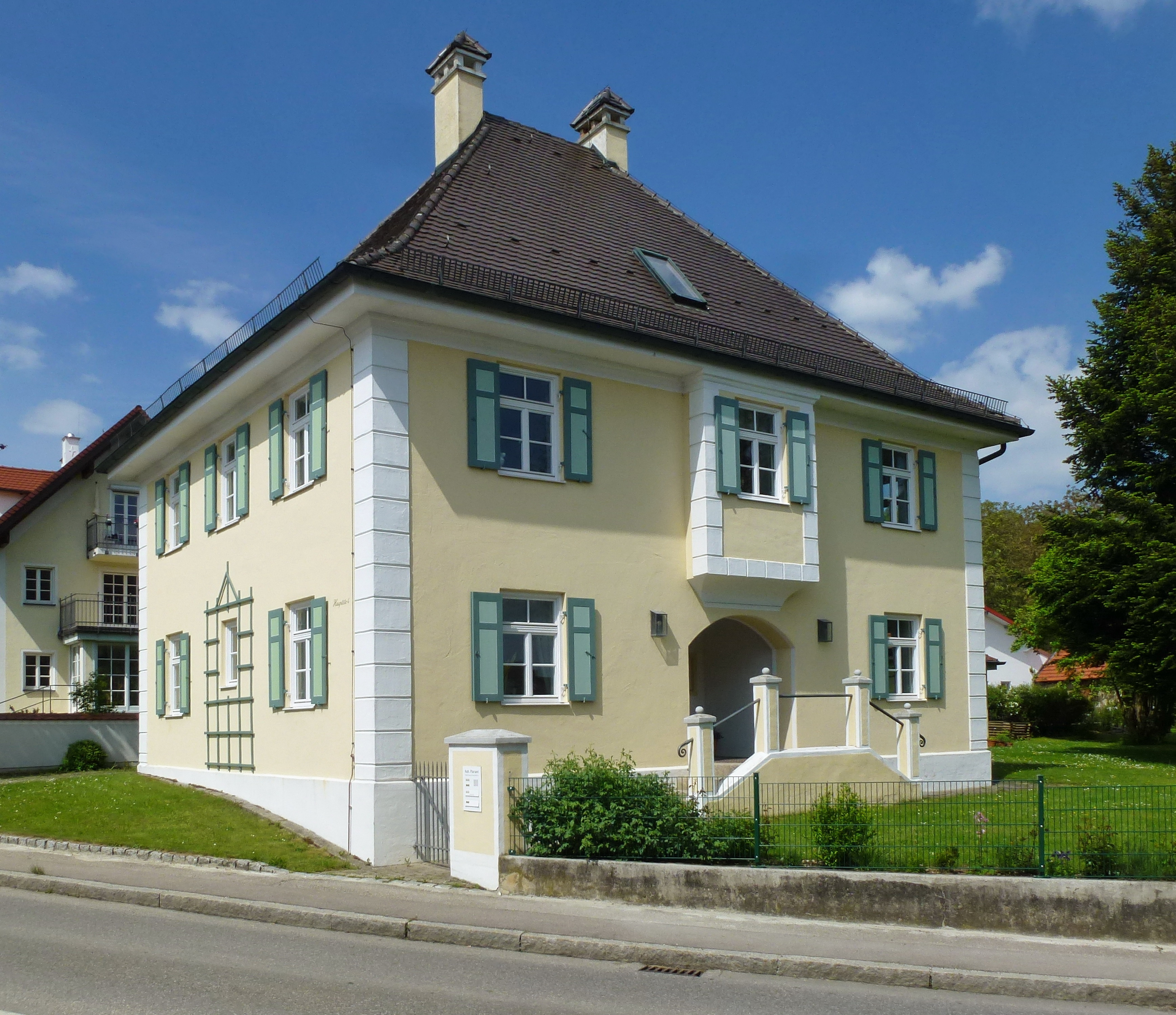 Hattenhofen_Hauptstr4 Pfarrhaus. Ansicht von Süden